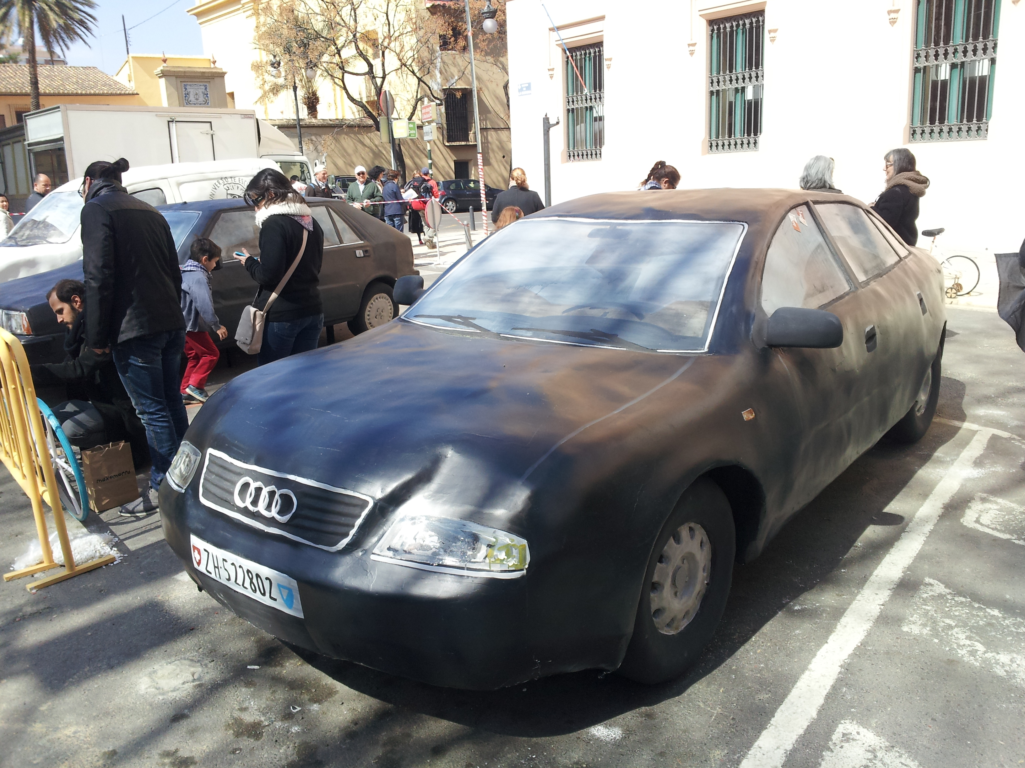 Escenes de la Falla dissenyada per Escif